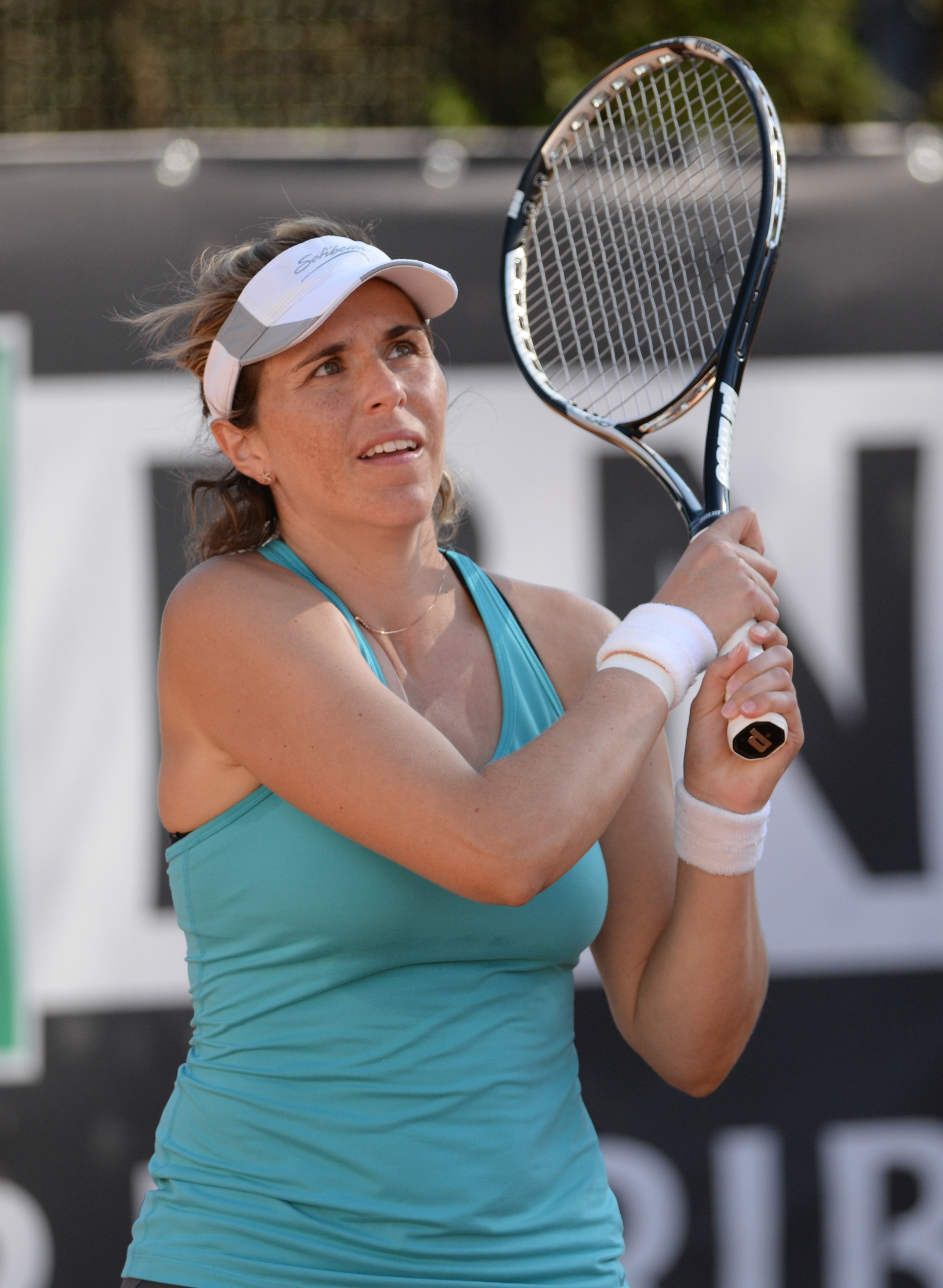 Maria Jose Martinez Sanchez